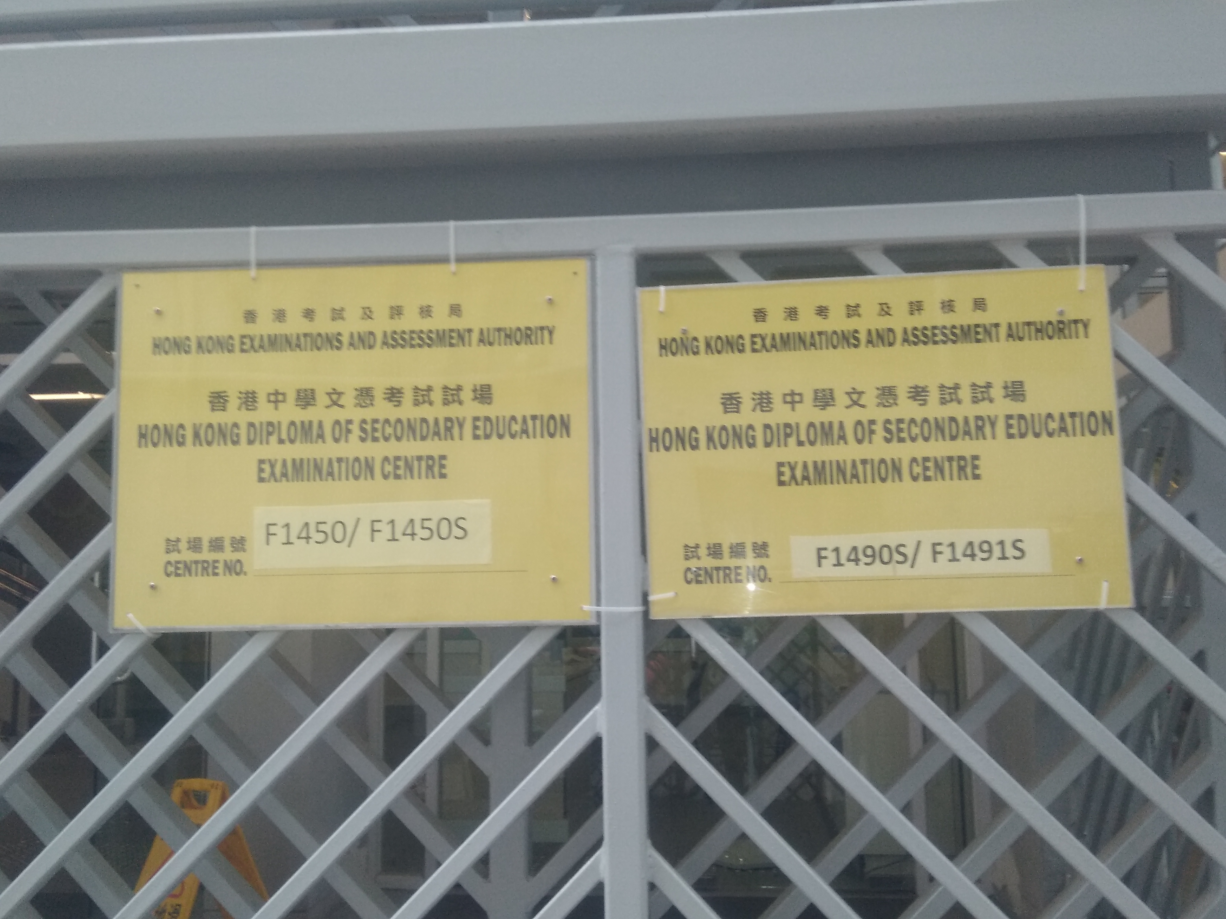 香港中學文憑考試試場